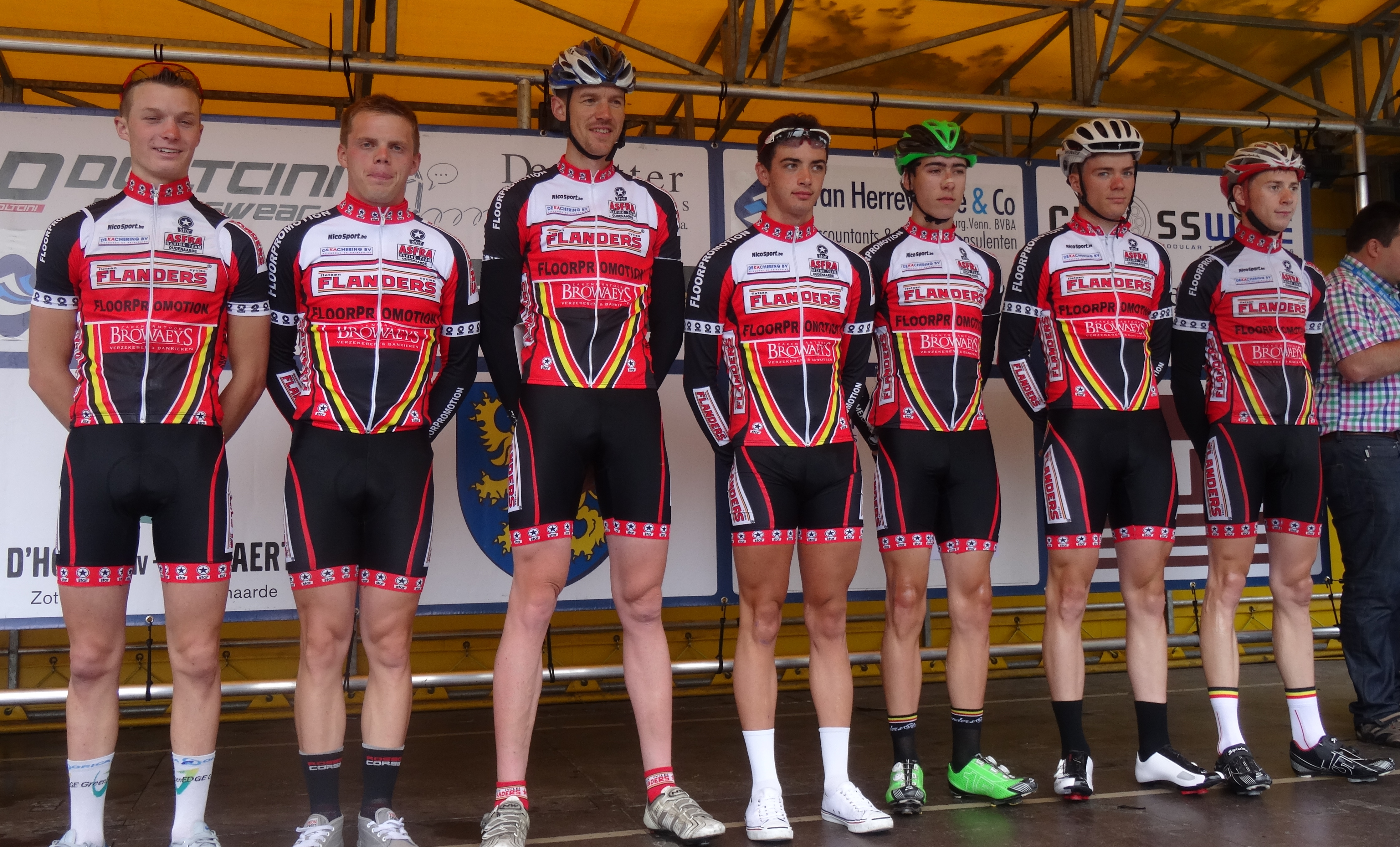 Reportage photographique réalisé le samedi 5 juillet à l'occasion du départ et de l'arrivée du Circuit Het Nieuwsblad espoirs 2014 à Grotenberge (Zottegem), Belgique.